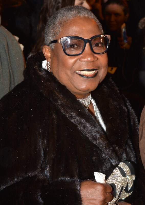 Firmine Richard à la cérémonie des Globes de cristal